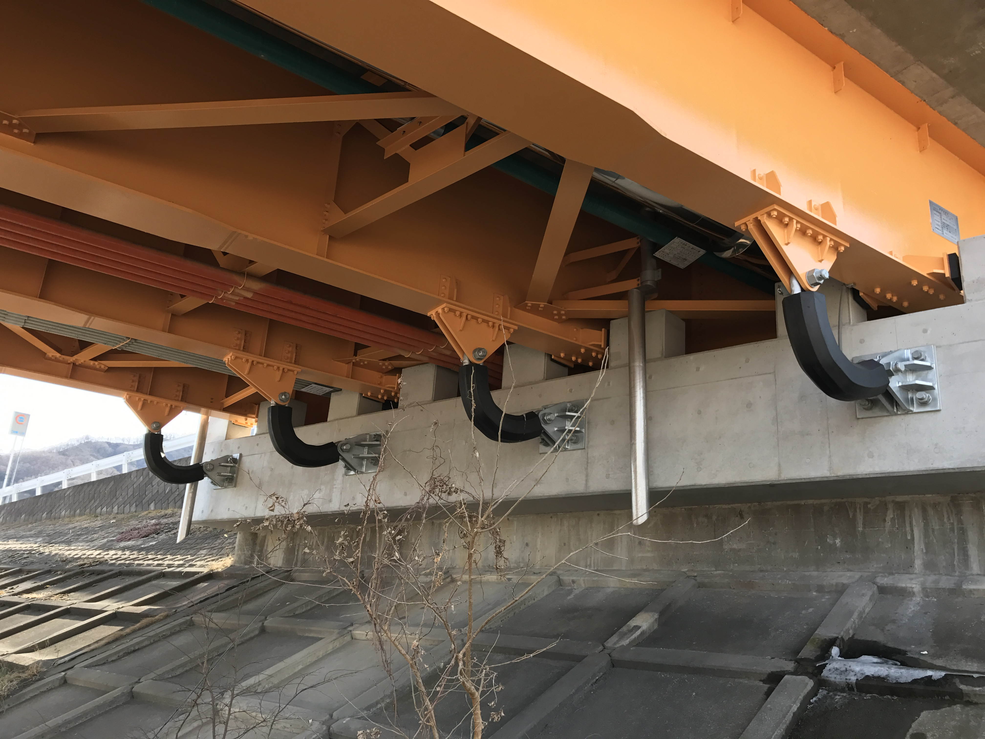 橋梁、支承部の落橋防止構造の一例。（ 上田市小牧橋）